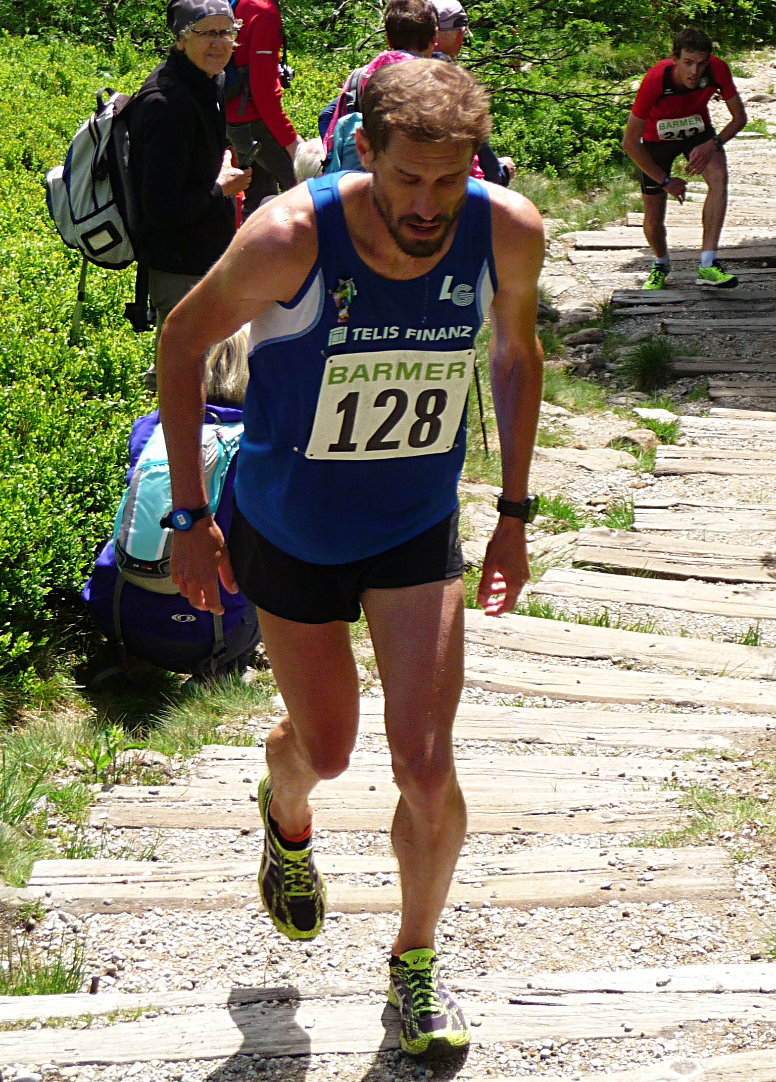 Sebastian Hallmann im Schlussanstieg am Großen Arber bei den Deutschen Berglauf-Meisterschaften 2017